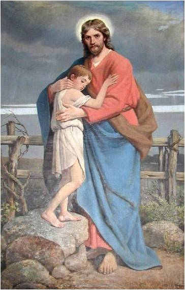 Хрыстос і сірата